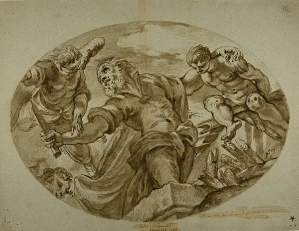 Pedro de Valpuesta, El sacrificio de Isaac, dibujo a pluma y aguada, copia de una obra de Tintoretto. The Art Institut of Chicago.